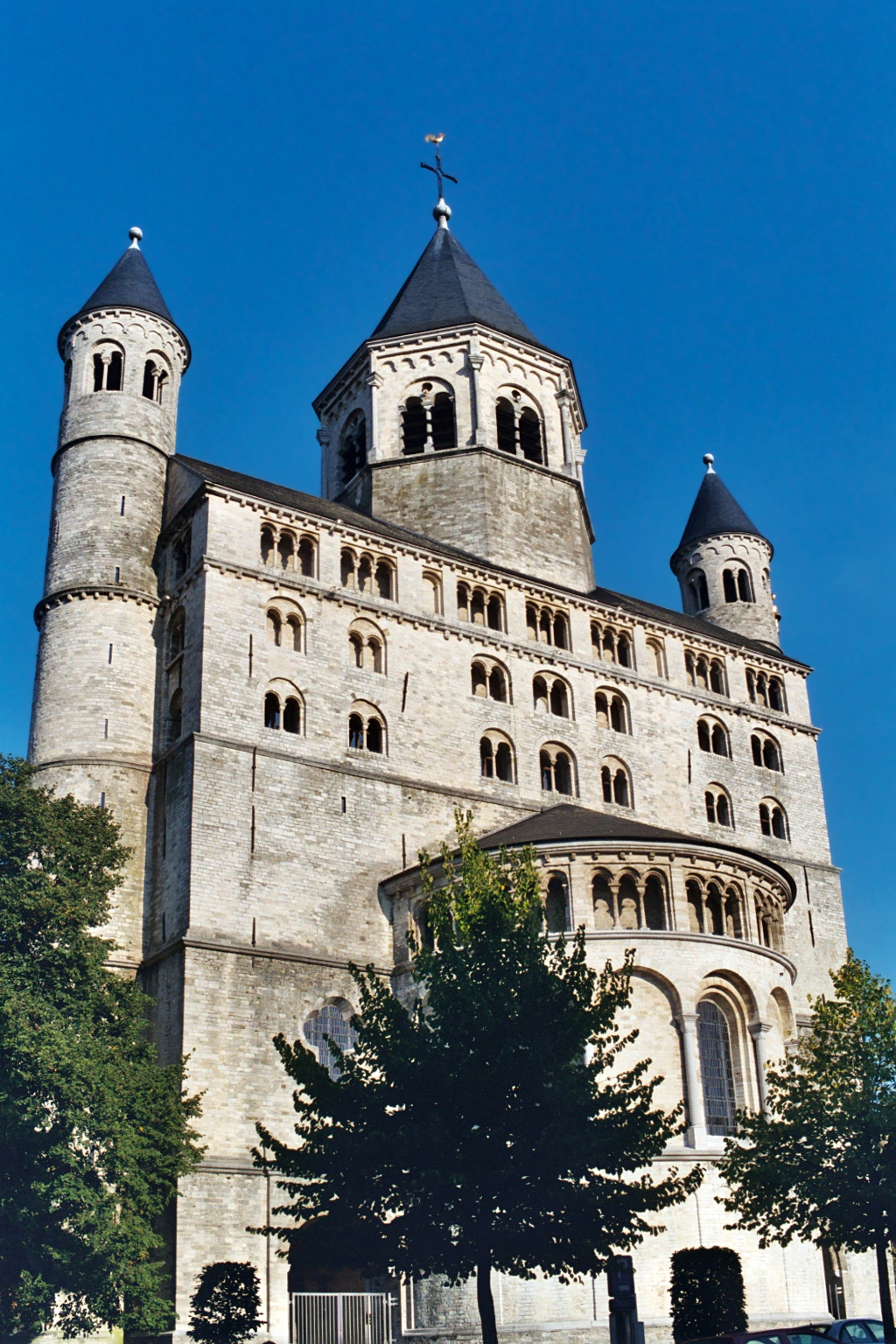 Belgique - Brabant wallon - Nivelles - Collégiale Sainte-Gertrude